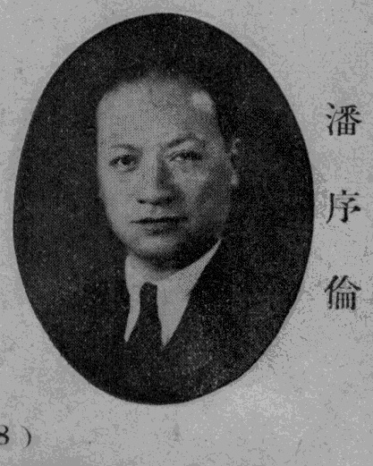 中文（台灣）: 《民國名人圖鑑》肖像